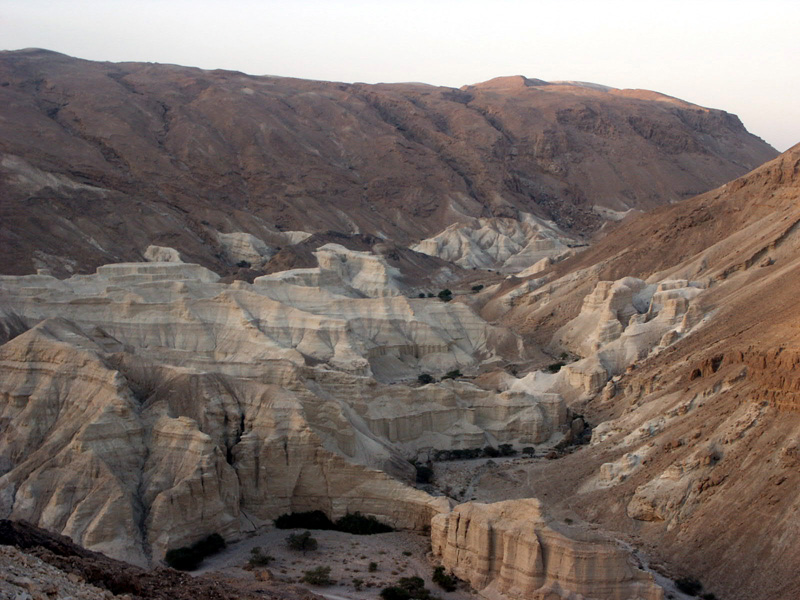 Judean Desert